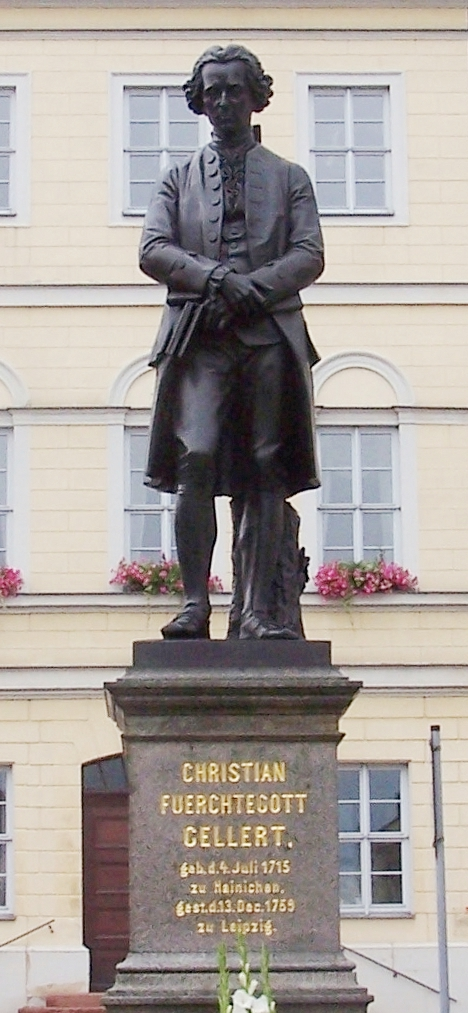 Hainichen, Denkmal Christian Fürchtegott Gellert, Skizze von Ernst Rietschel, Ausführung von Friedrich Wilhelm Schwenk, 1865